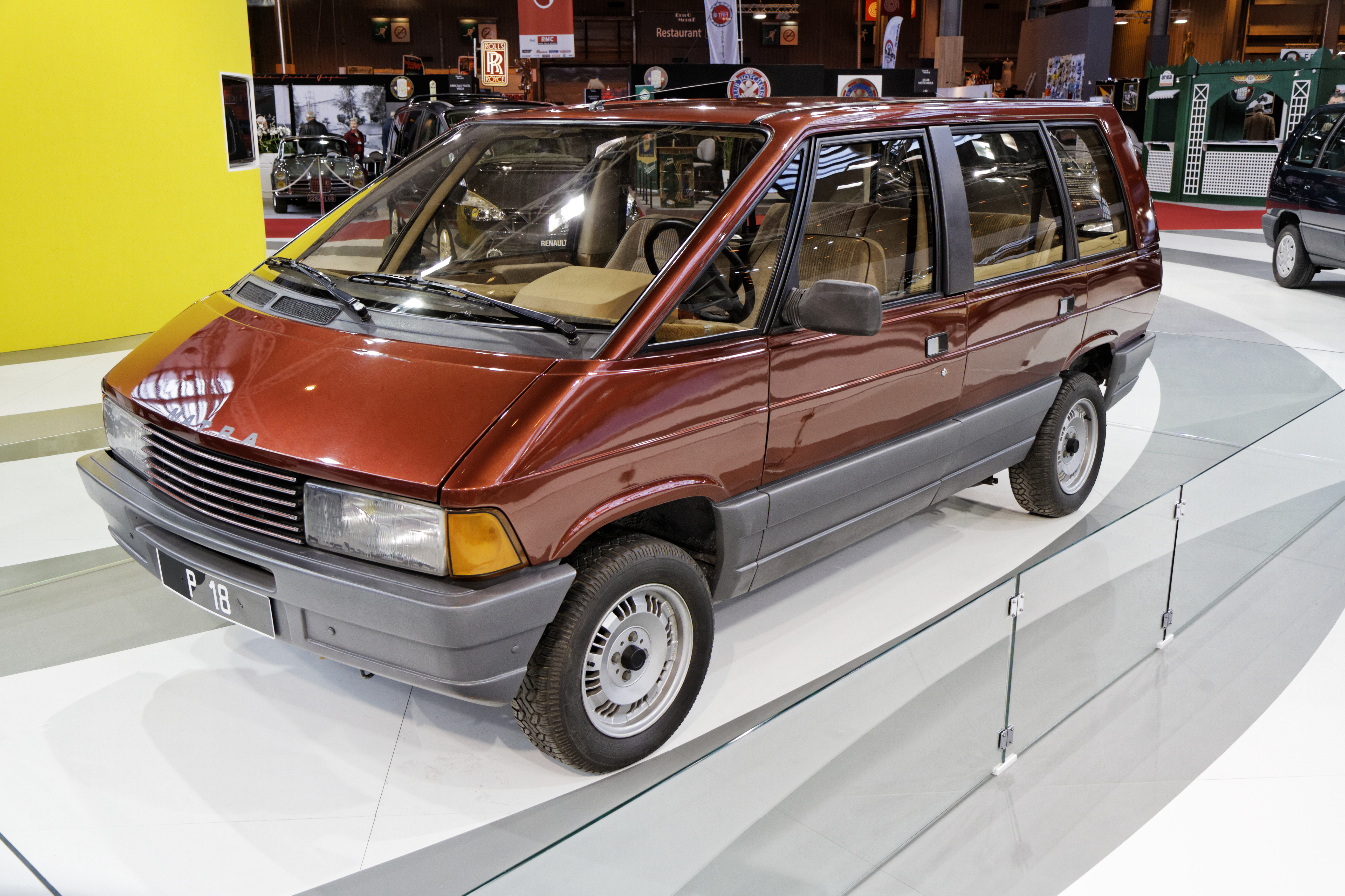 Une Matra Projet P18 présentée lors du salon Retromobile 2014.